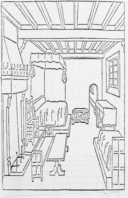 Llit